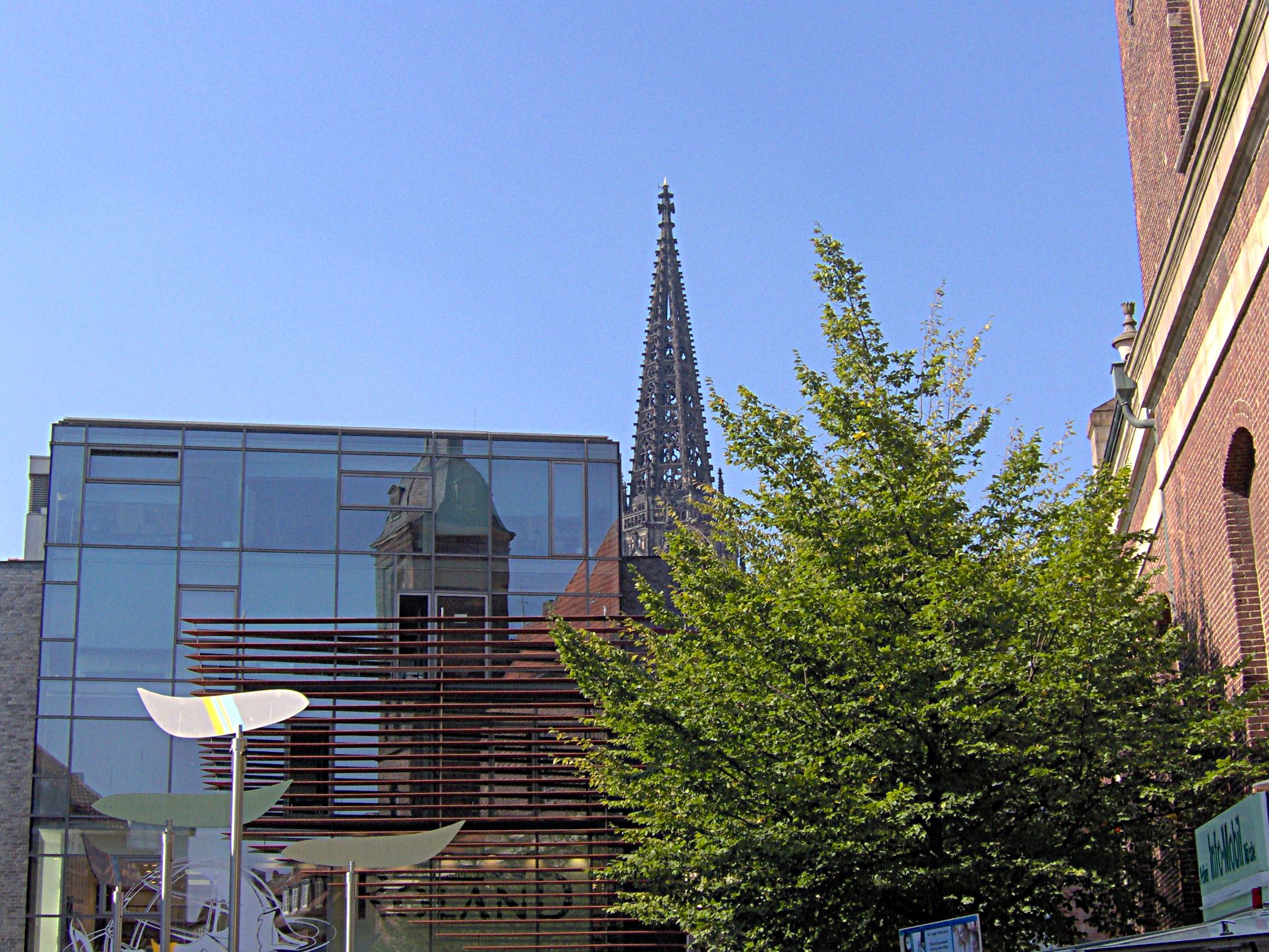 Moderne und historische Architektur in Münster.